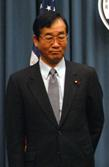 松岡利勝